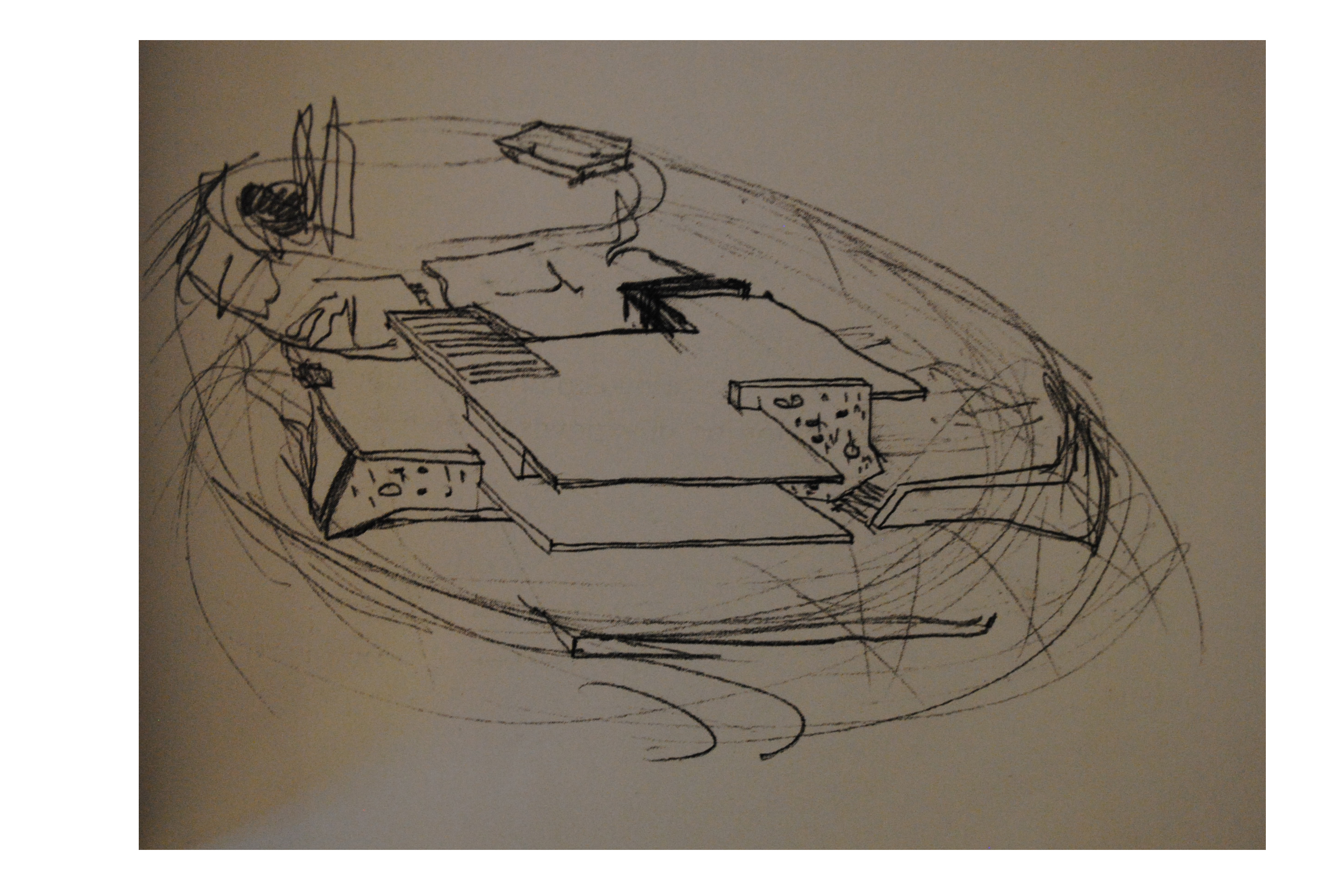 Αρχική ιδέα